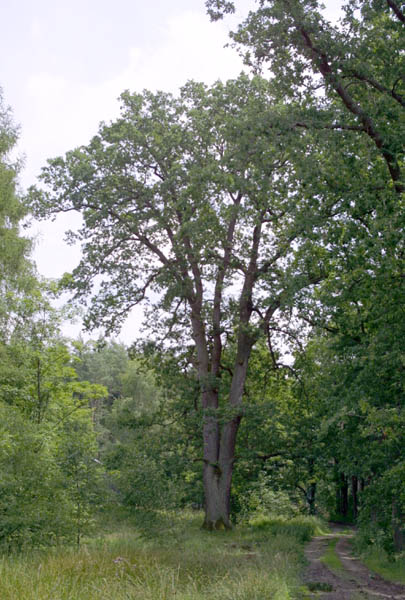 Památný strom Dub u Senětické hájenky.